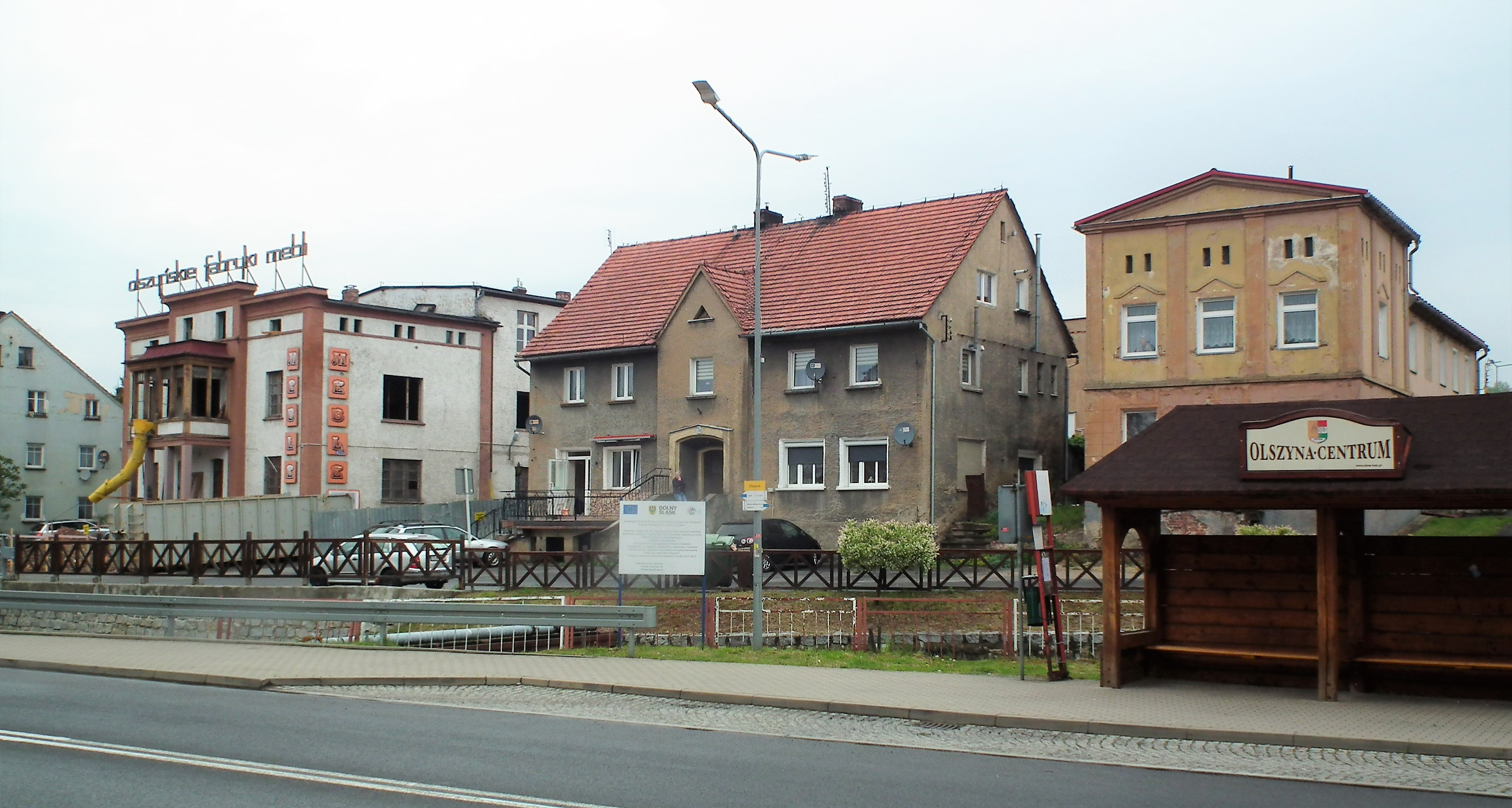 Centrum miasta Olszyna na Łużycach.